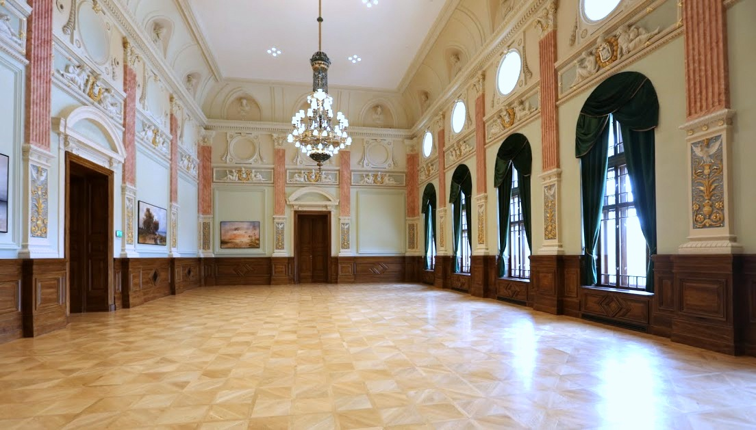 Magyar Királyi Honvéd Ludovika Akadémia, díszterem